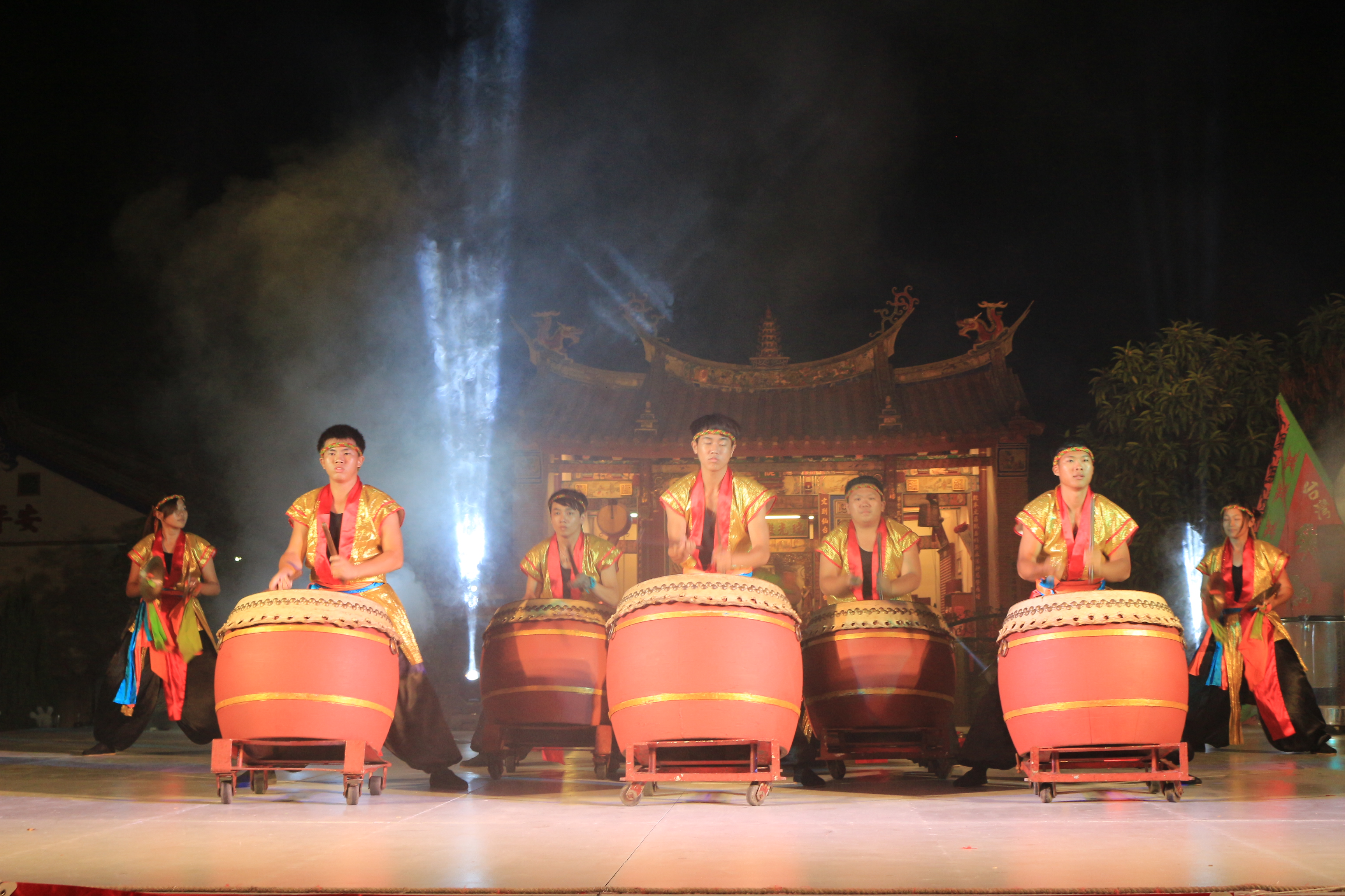 中文（台灣）: 以醒獅鼓樂為主，營造熱鬧氣氛，以嶄新的配器手法，用新元素創造不同於傳統的演奏展現。加入武術打擊元素，將傳統樂器溶入震撼的曲目